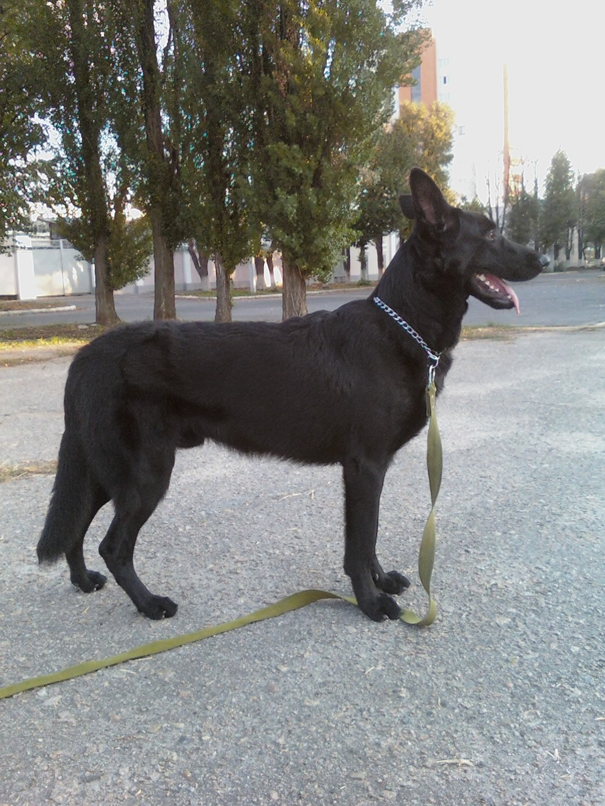 Флэш Блэк Вом Истхаус. Восточно европейская овчарка 10 месяцев.